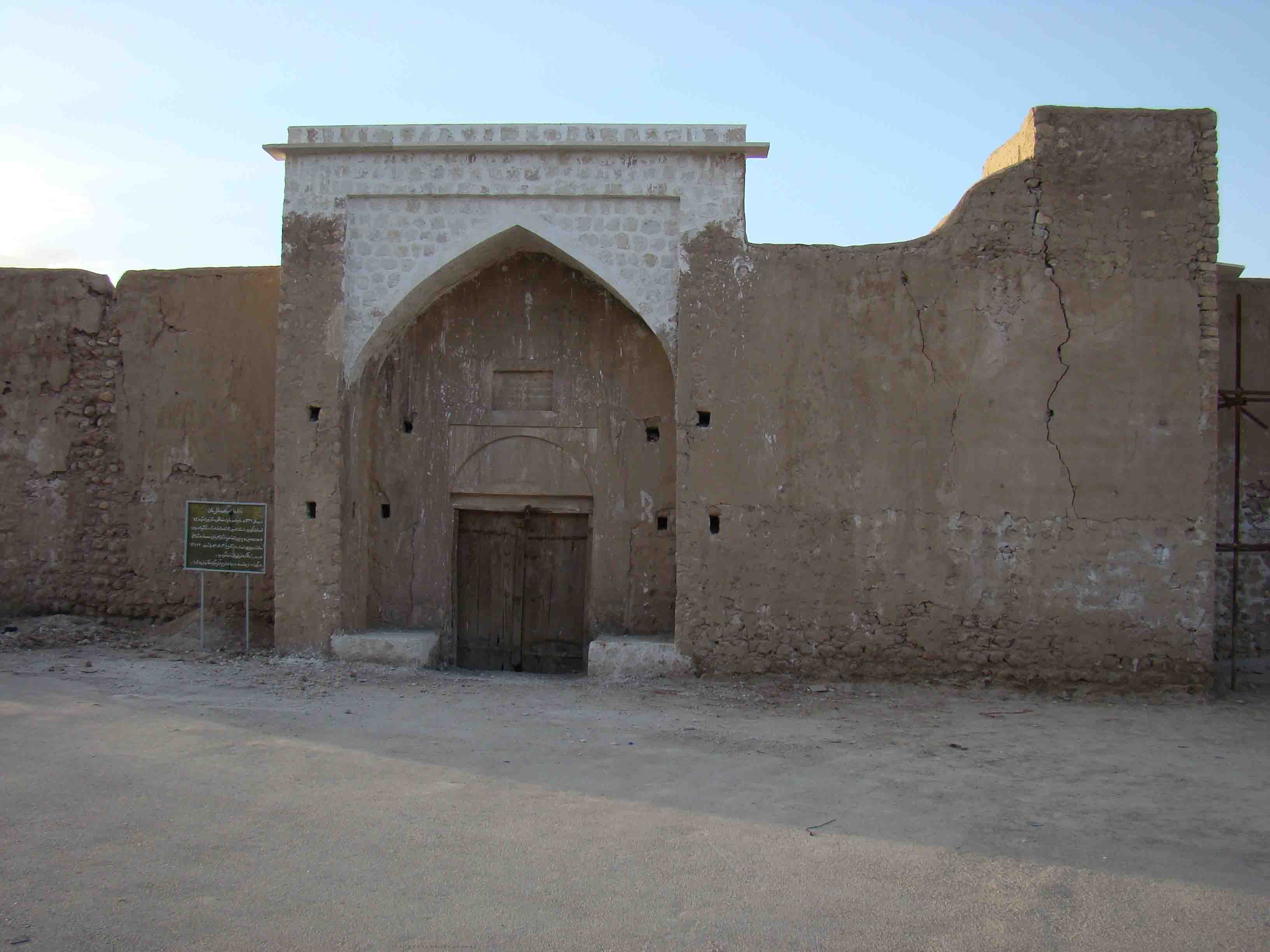 نمای ورودی کاروانسراي رضا قلي خان جويم